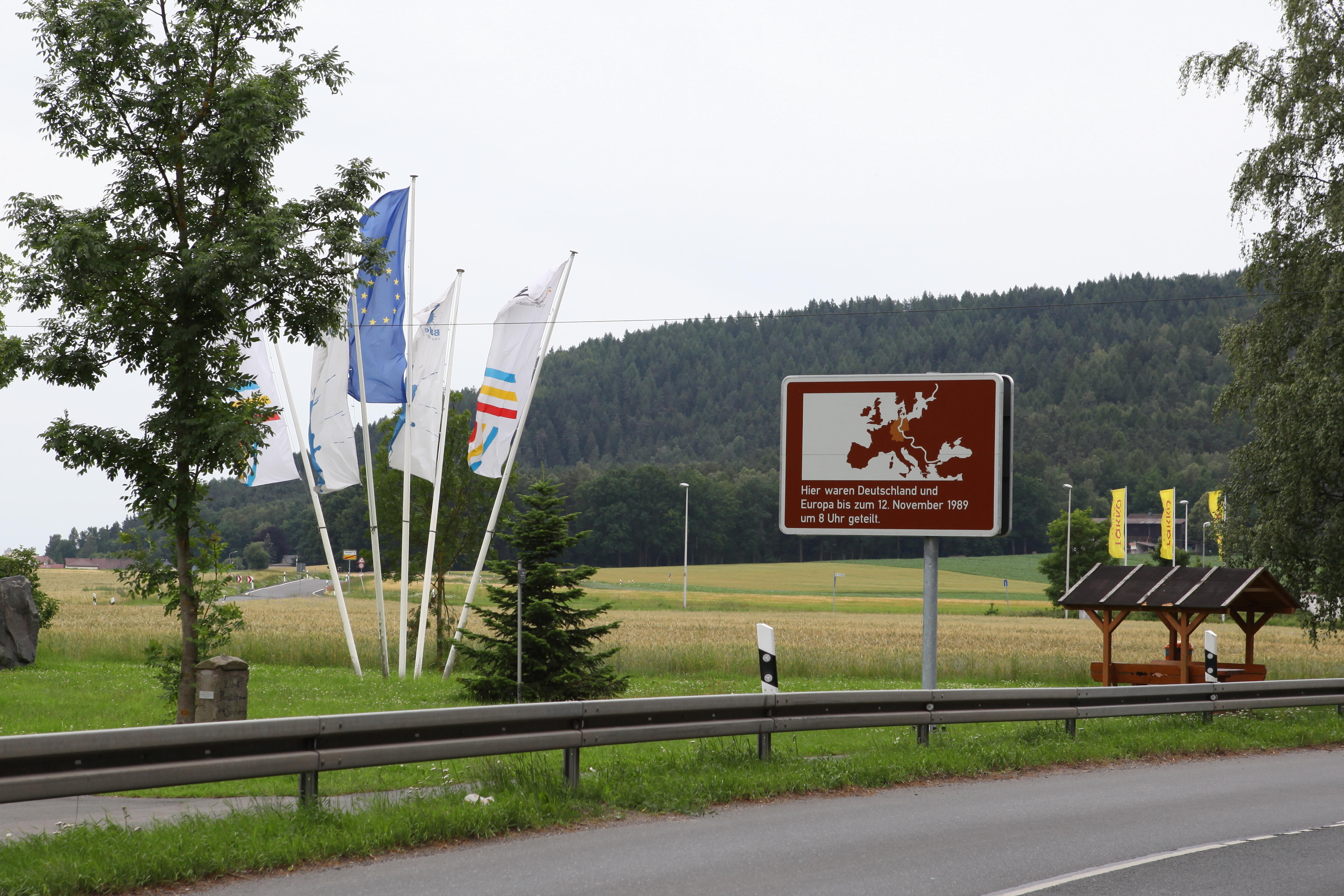 Grenzpunkt Gebrannte Brücke in Hönbach, OT von Sonneberg, Thüringen